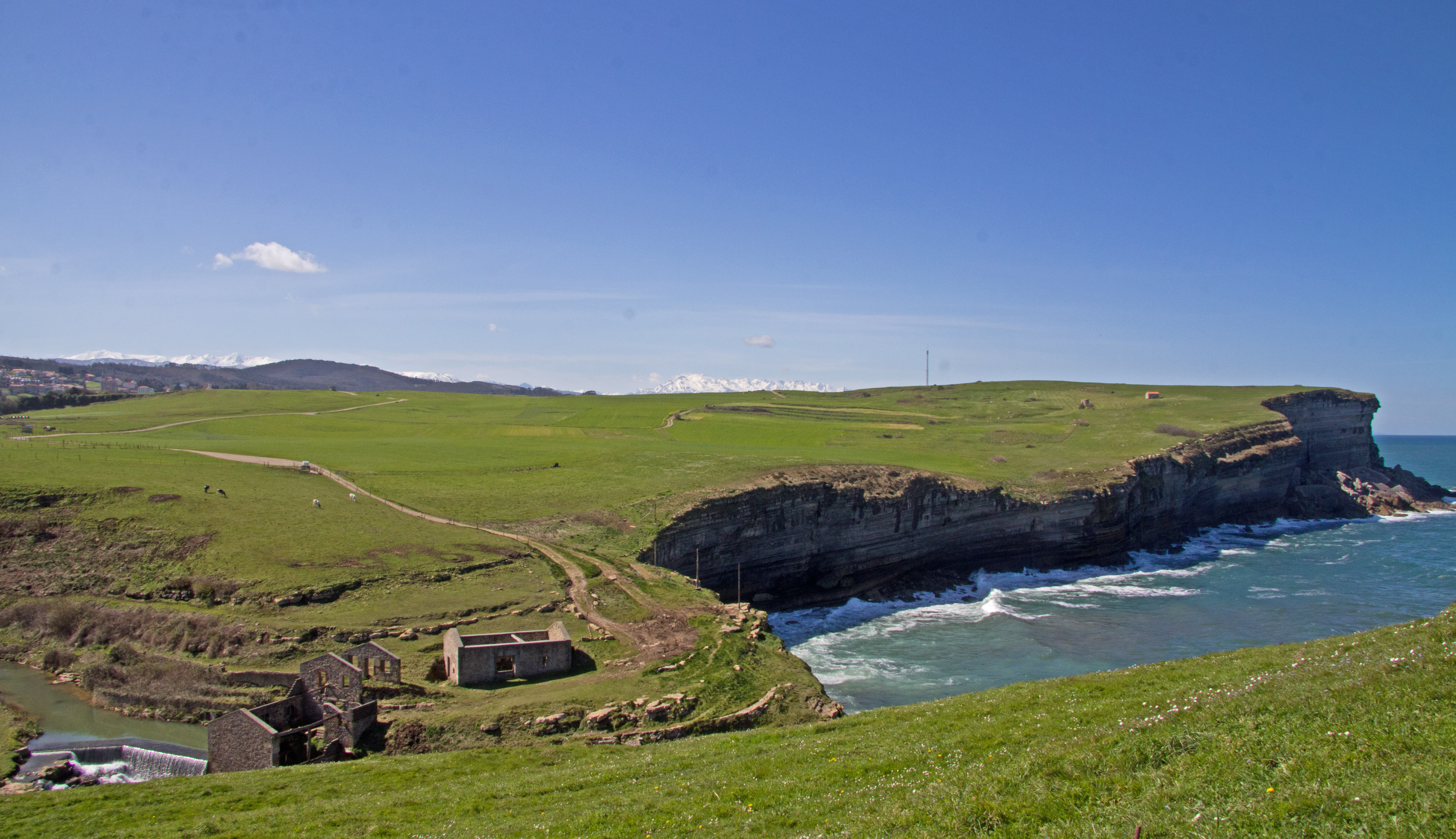 se divisan los picosdeEuropa Cantabria Toñanes